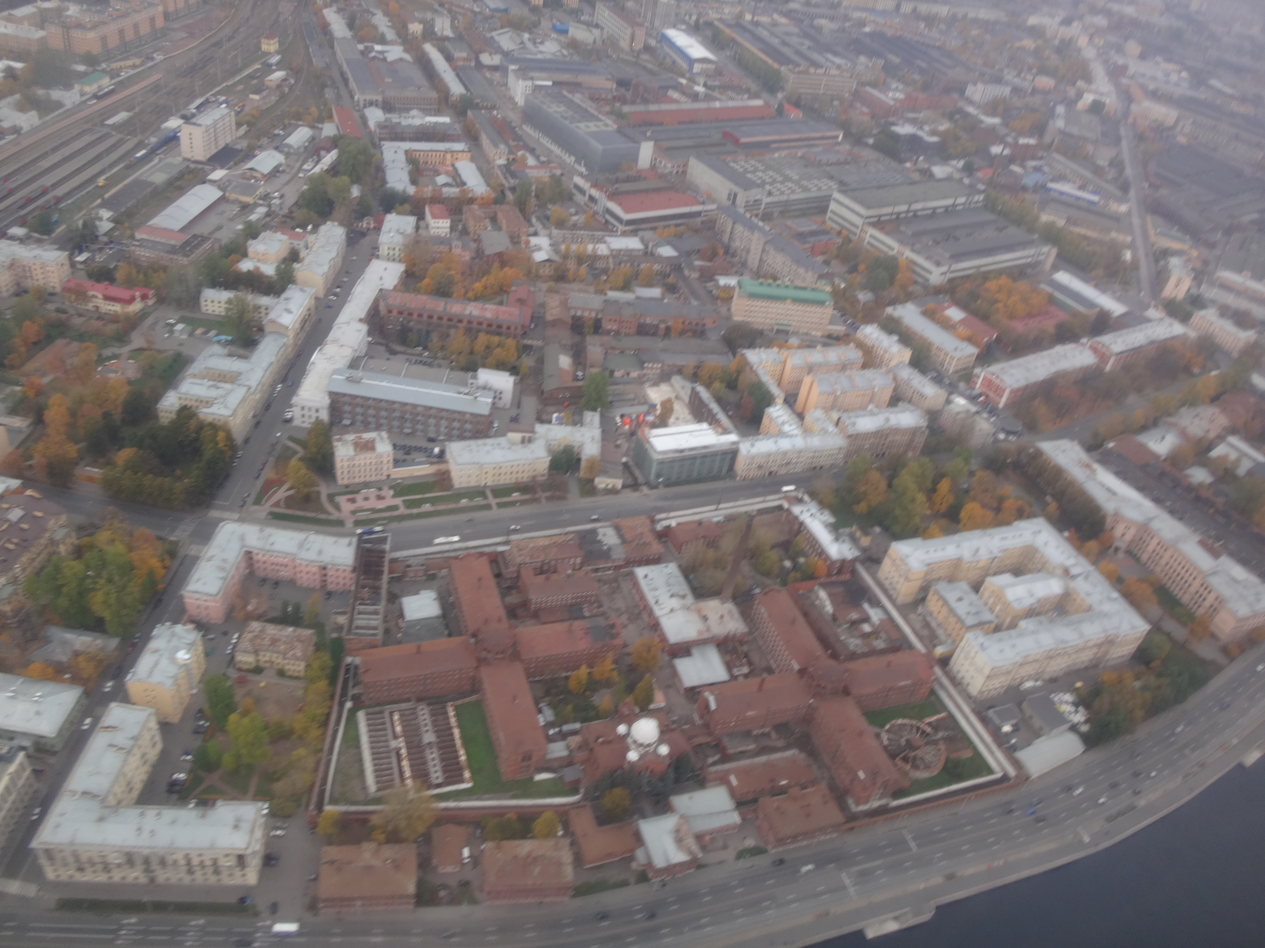 Вид с вертолёта на тюрьму Кресты